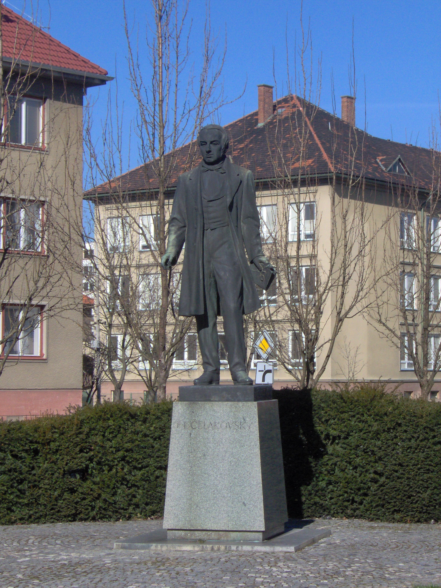 Statue of František Ladislav Čelakovský in Strakonice - Socha Františka Ladislava Čelakovského ve Strakonicích